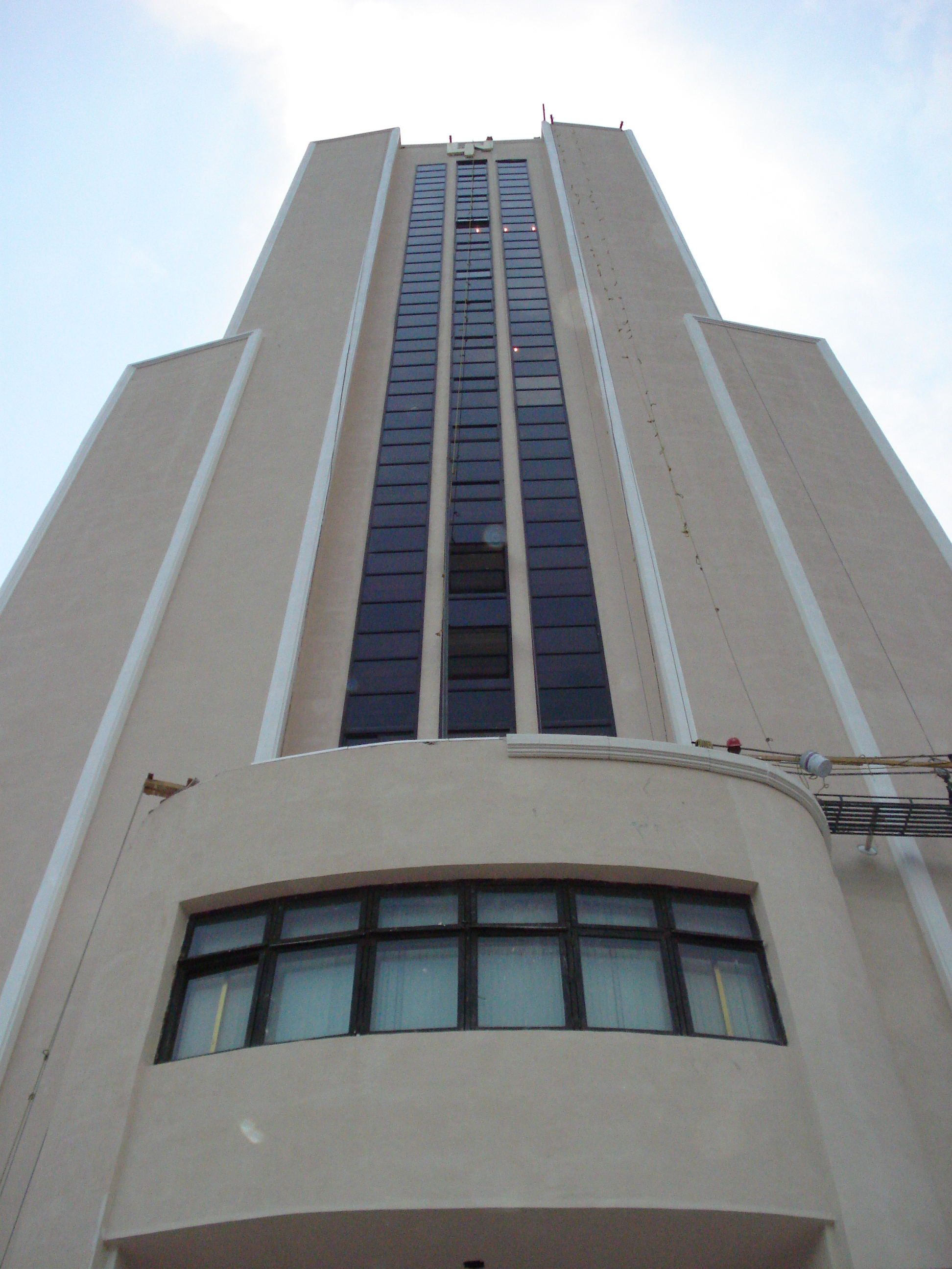 Renovación de la fachada del Edifico El Moro en la Ciudad de México